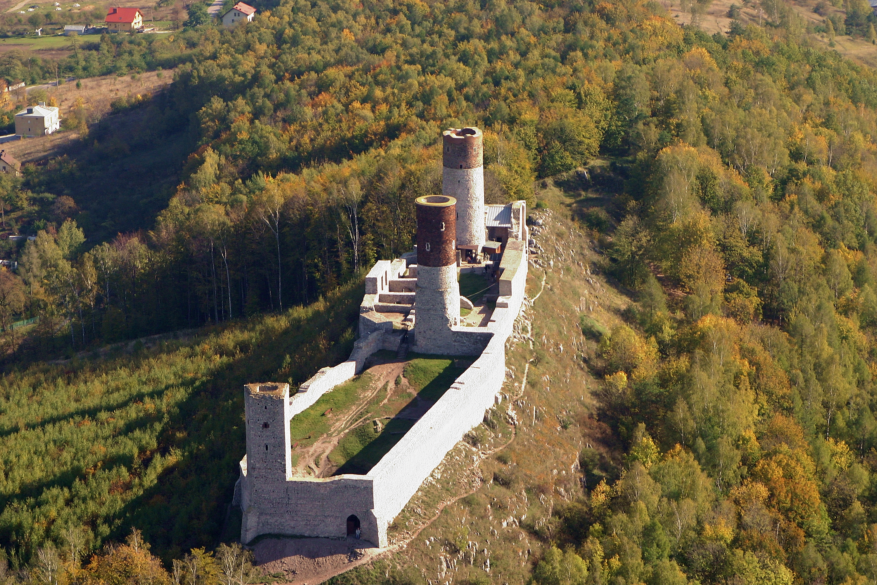 Chęciny. ruiny zamku, XIII/XIV, XVI w..